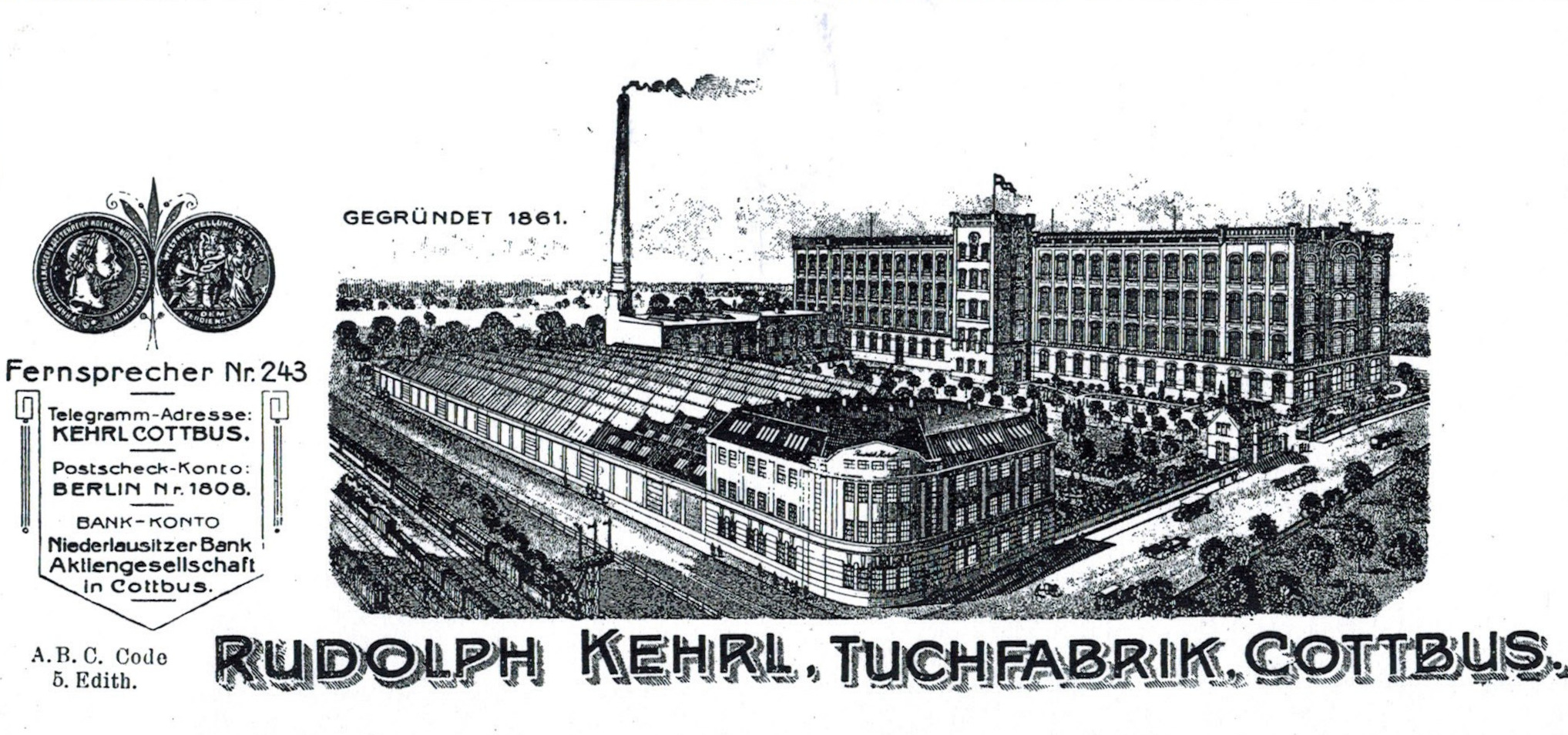 Fabrik Kehrl, früher